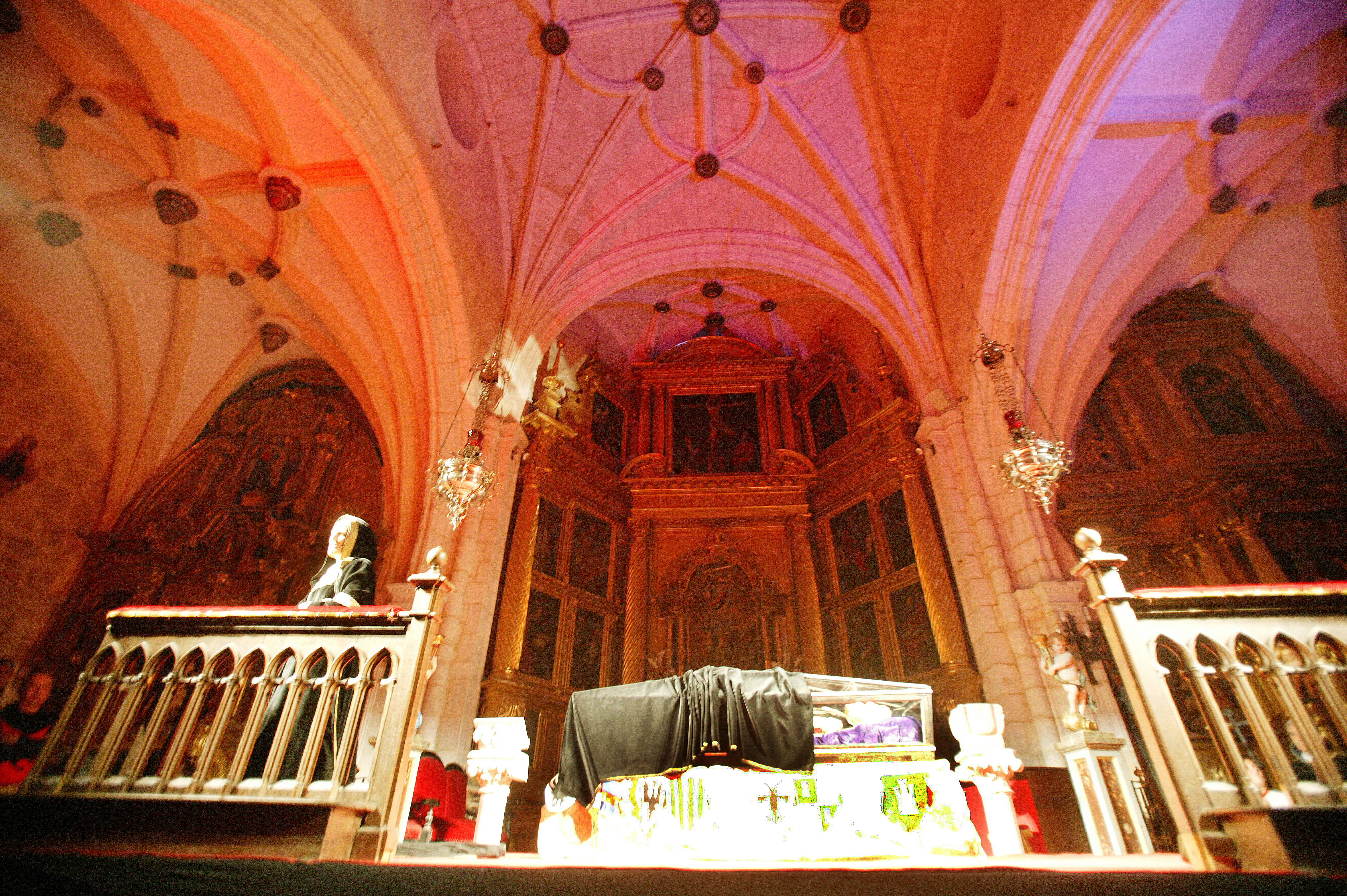 Momento en la representación de "ciega razón" en el interior de la Iglesia de Arcos de la Llana